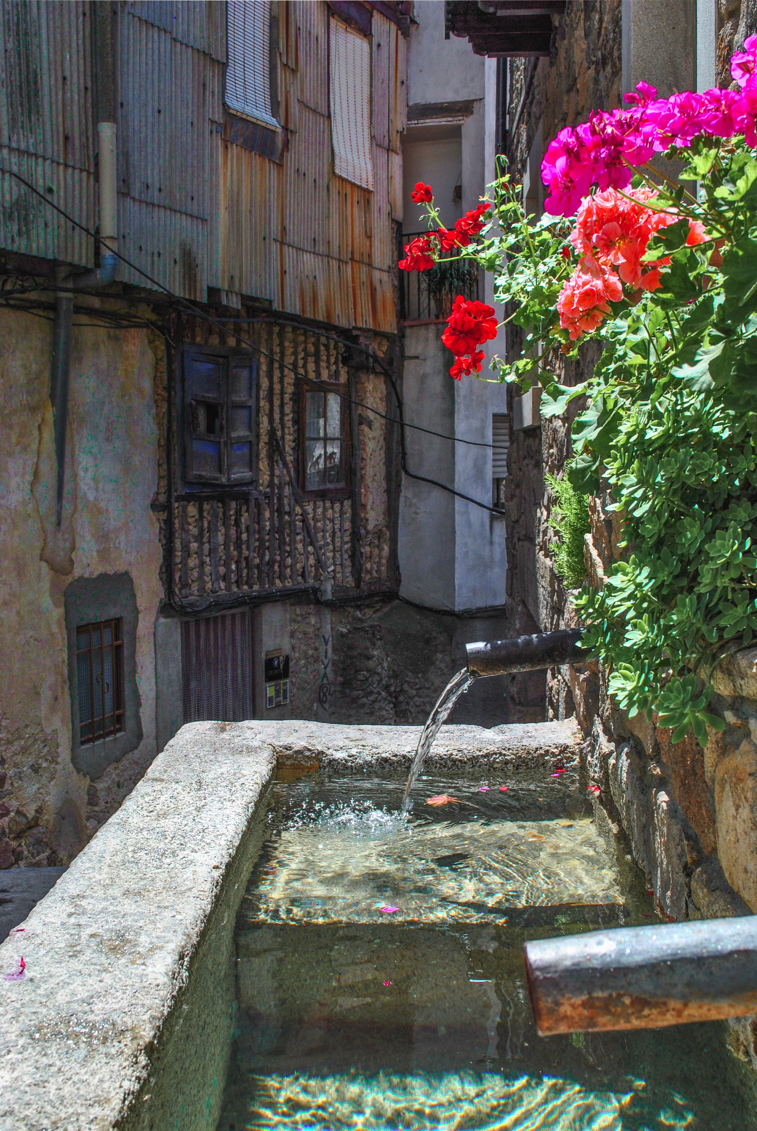 Fuente de manatial